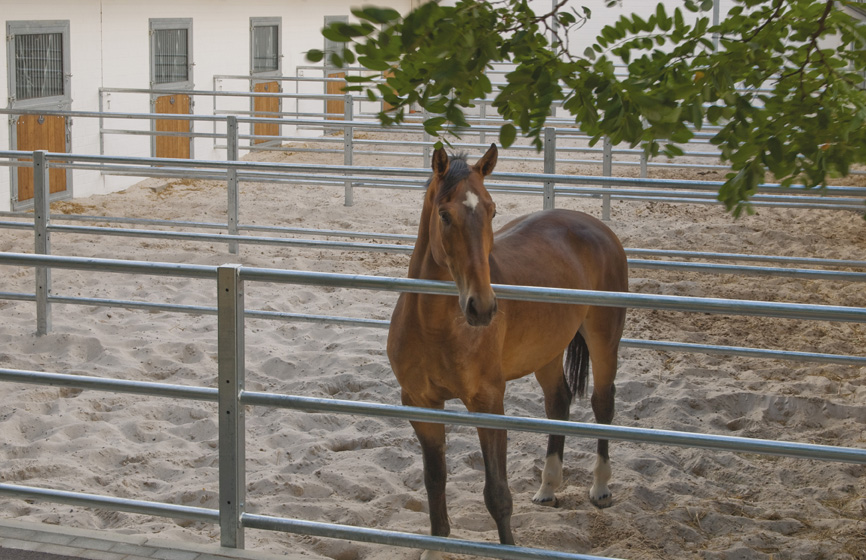 Paddock, horse paddock